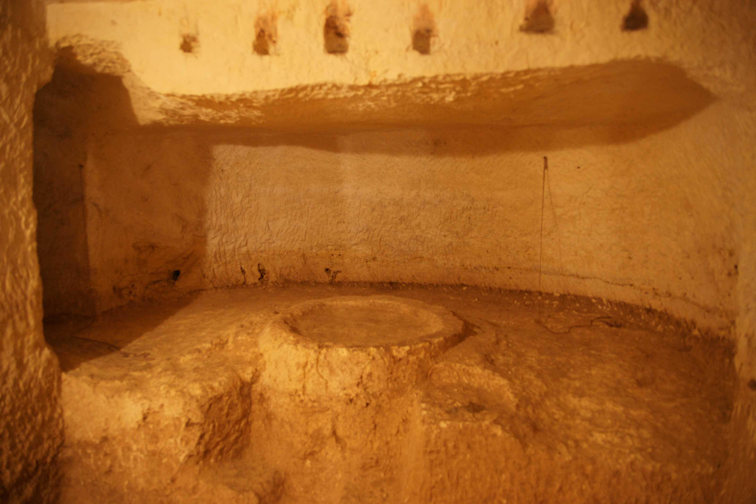 Katakomben unter St. Paul's Grotto